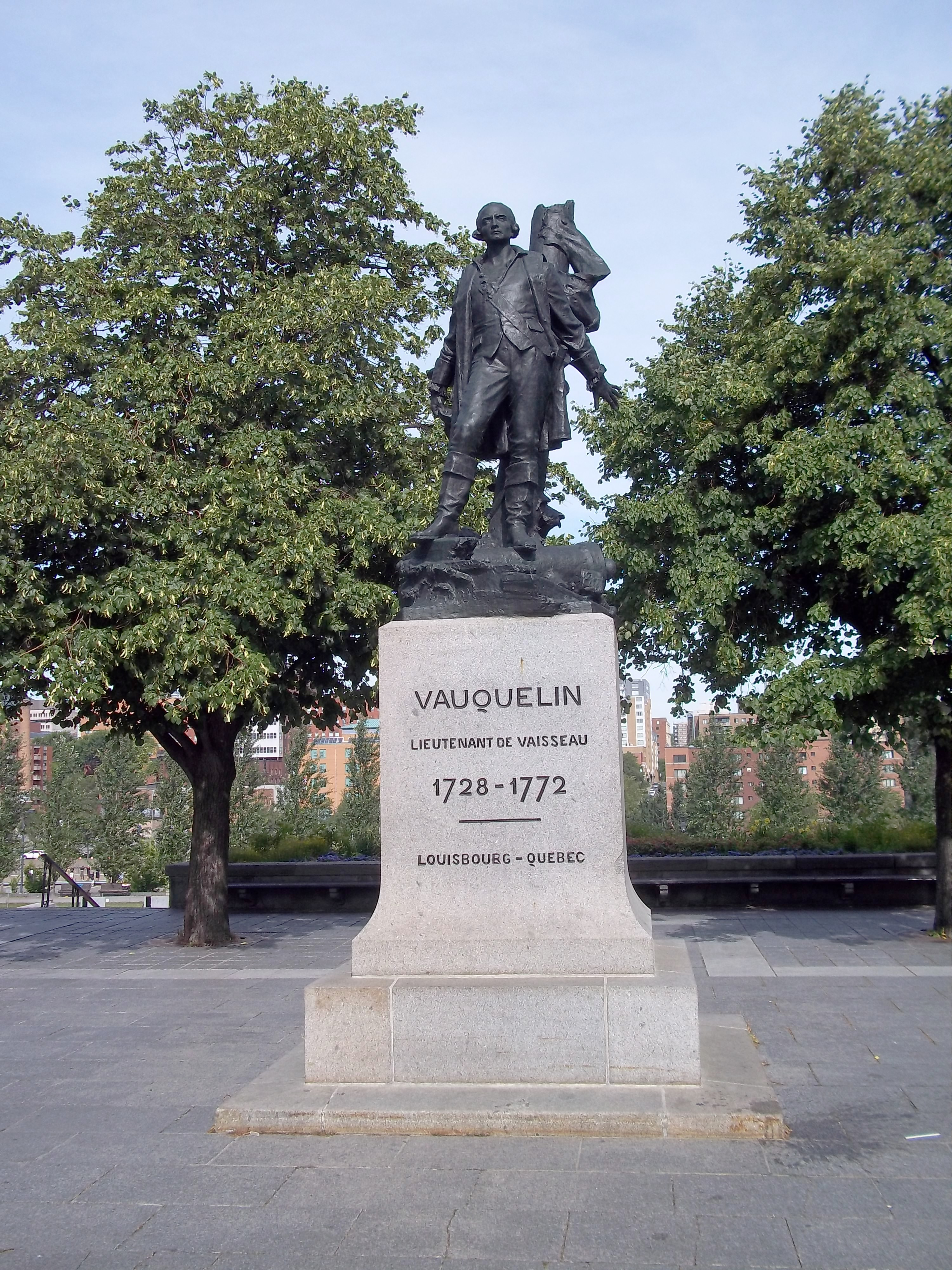 Monument à Jean Vauquelin, place Vauquelin, Vieux-Montréal, à l'ouest de l'Hôtel de Ville